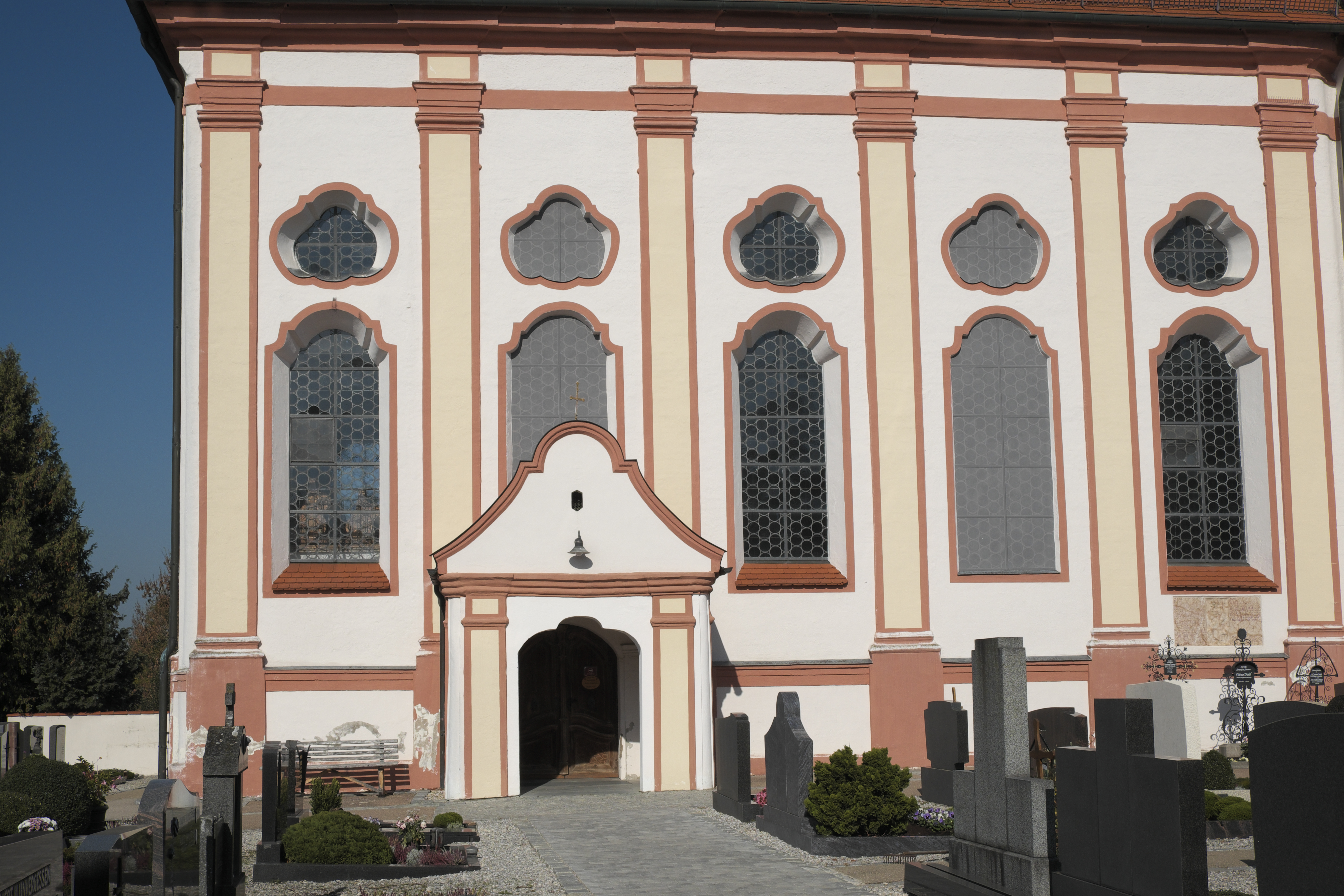 Katholische Pfarrkirche St. Jakobus in Vierkirchen im Landkreis Dachau (Bayern/Deutschland), Langhaus mit Vorzeichen